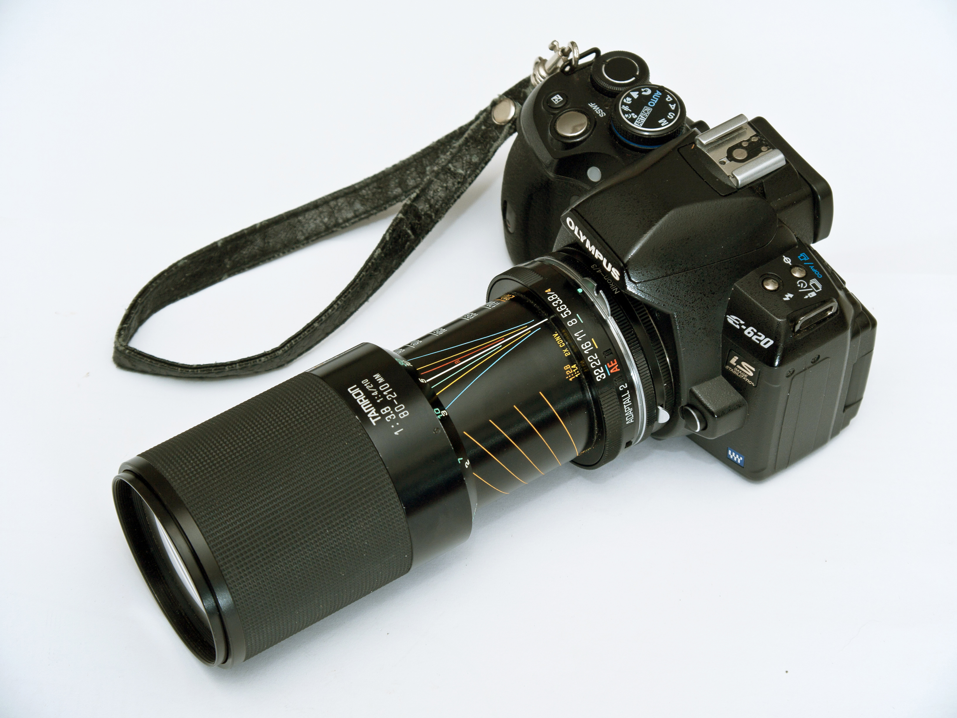 Tamron Adaptall-2 80-210 lens op een Olympus E620 body.